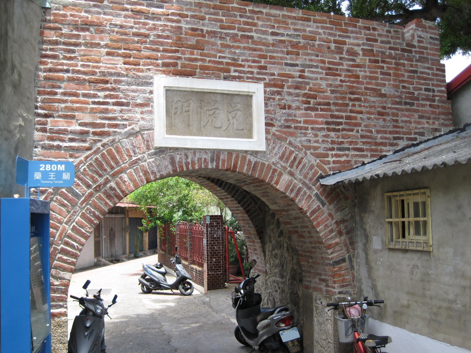 臺南市的兌悅門